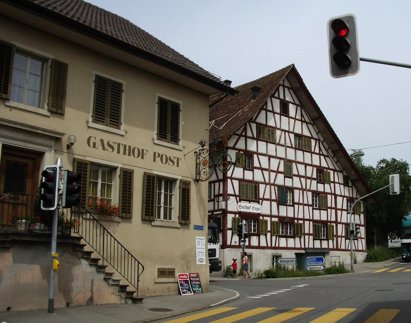 Ottenbach ZH, Switzerland